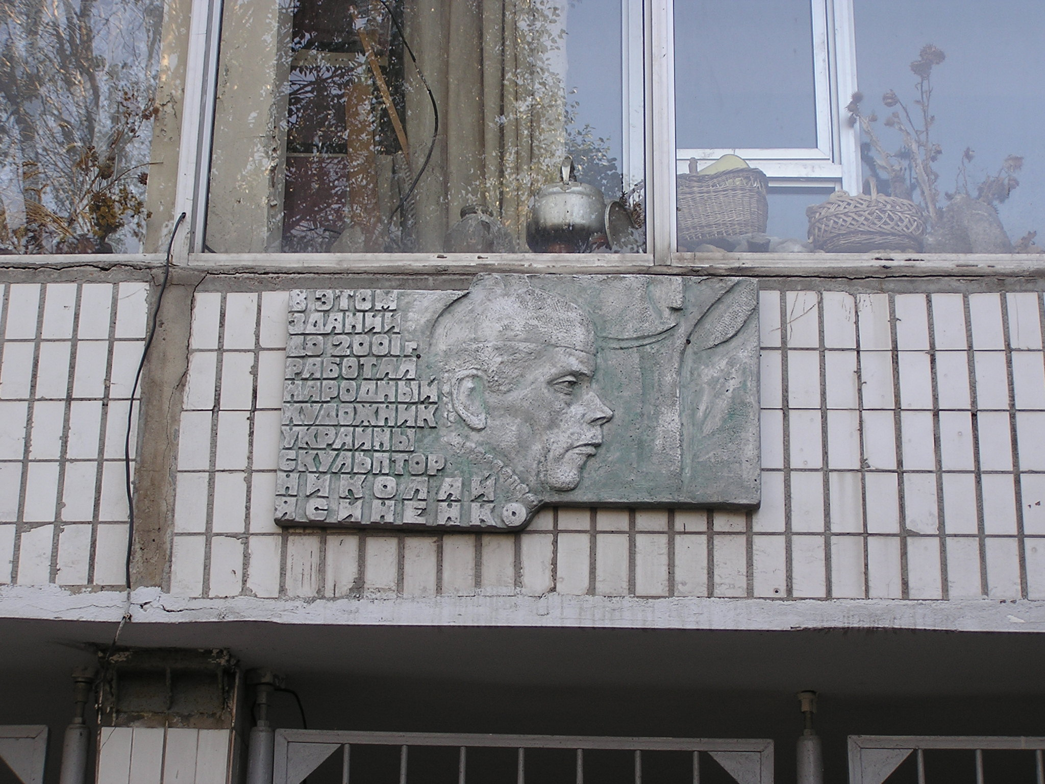 Донецк. Ясиненко, Николай